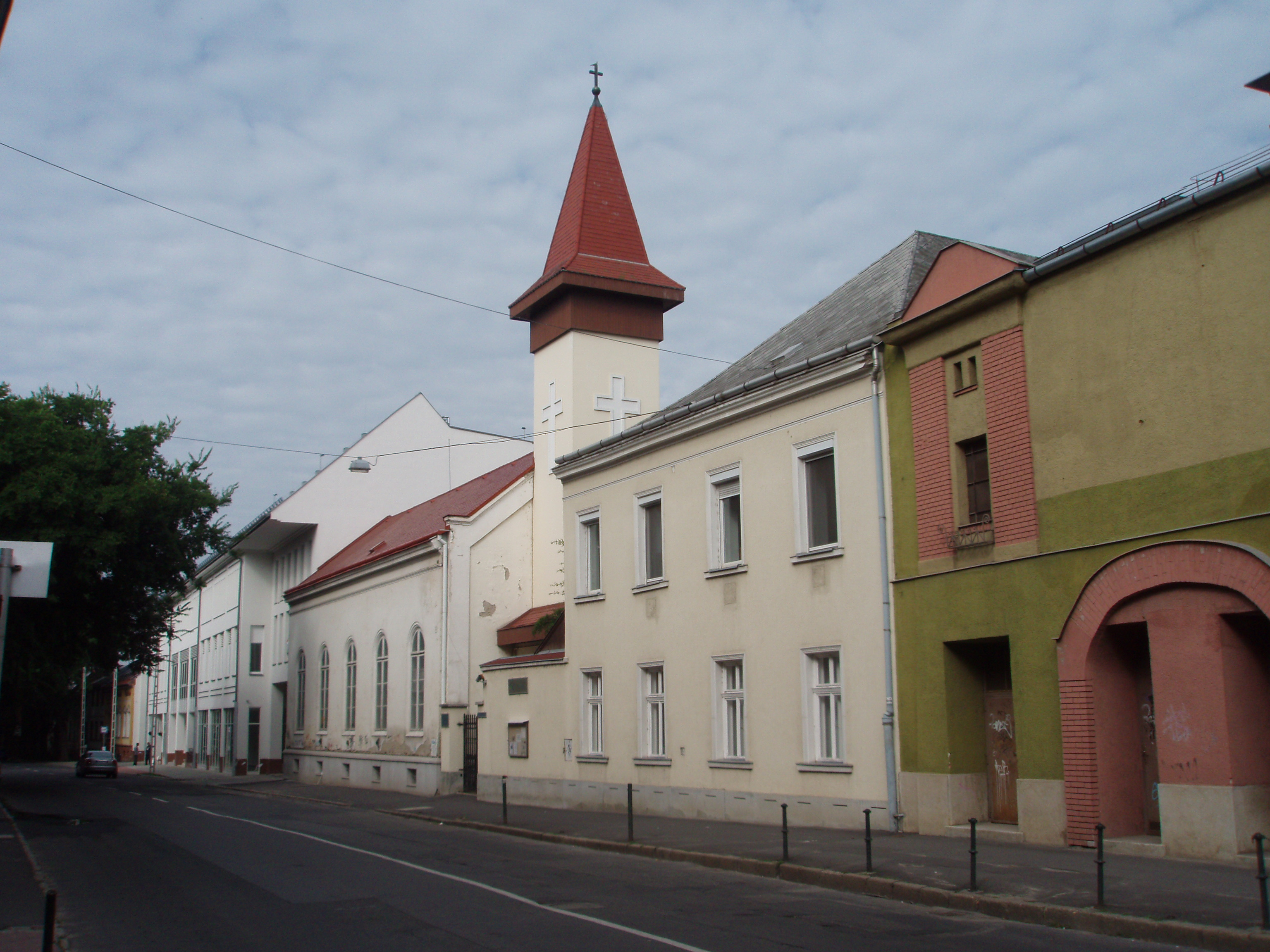 Debrecen-Miklós utcai evangélikus templom